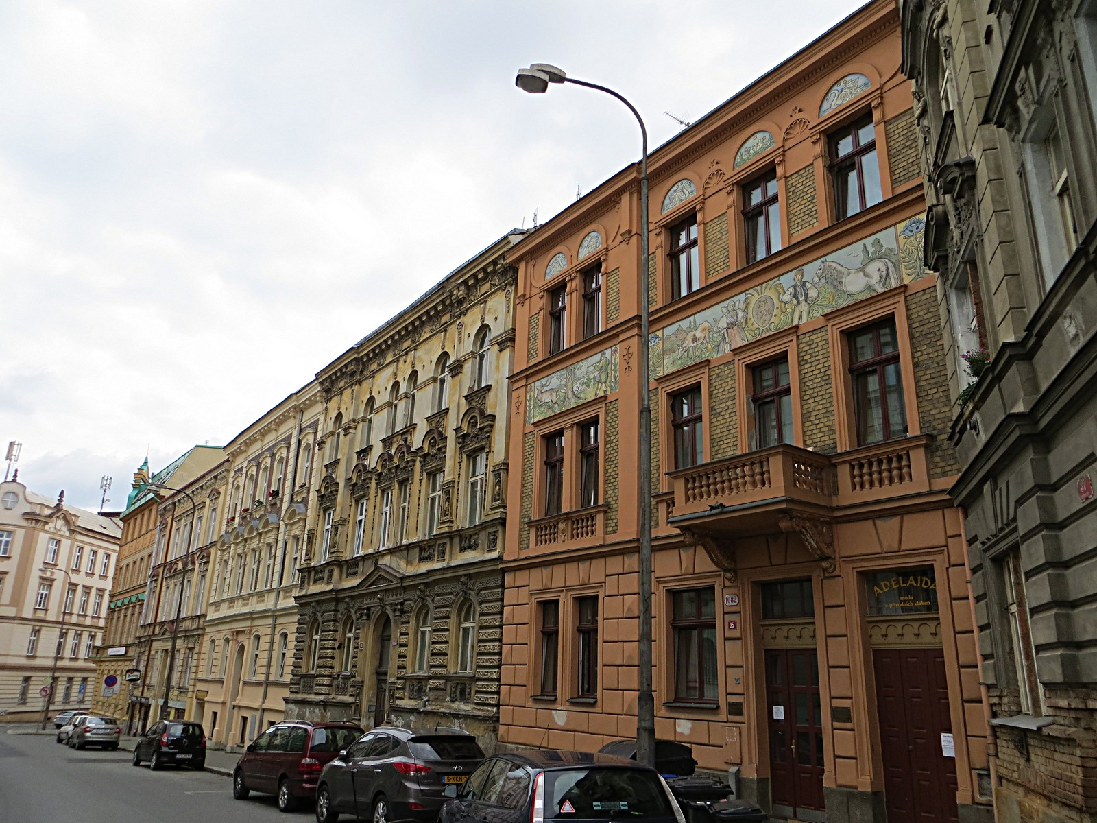 Purkyňova